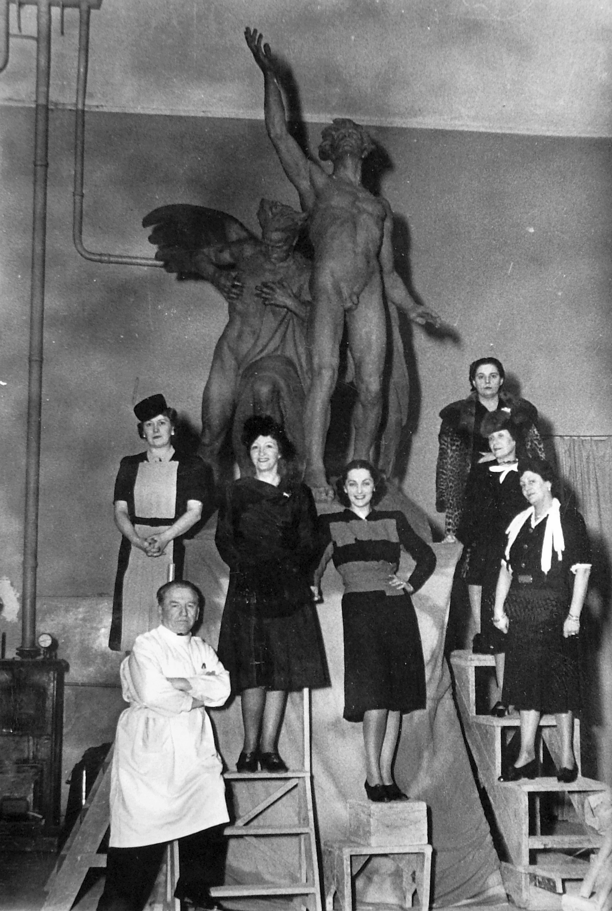 Kisfaludi Strobl Zsigmond műterme, a meg nem valósult Madách emlékmű gipszmintája. Fehér köpenyben a szobrász, mögötte az egykor Évát játszó színésznők: Lánczy Margit, Lukács Margit, Mátrai Erzsi, Paulay Erzsi, Szabó Margit és Tasnády Ilona. Location: Hungary Tags: studio, sculpture, tableau, women Title: Kisfaludi Strobl Zsigmond műterme, a meg nem valósult Madách emlékmű gipszmintája. Fehér köpenyben a szobrász, mögötte az egykor Évát játszó színésznők: Lánczy Margit, Lukács Margit, Mátrai Erzsi, Paulay Erzsi, Szabó Margit és Tasnády Ilona.